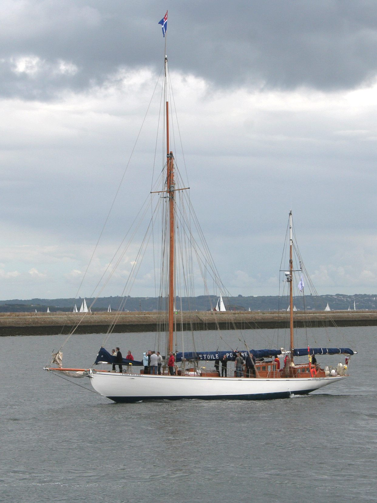 Etoile Polaire dans l'avant port de Brest (2008)